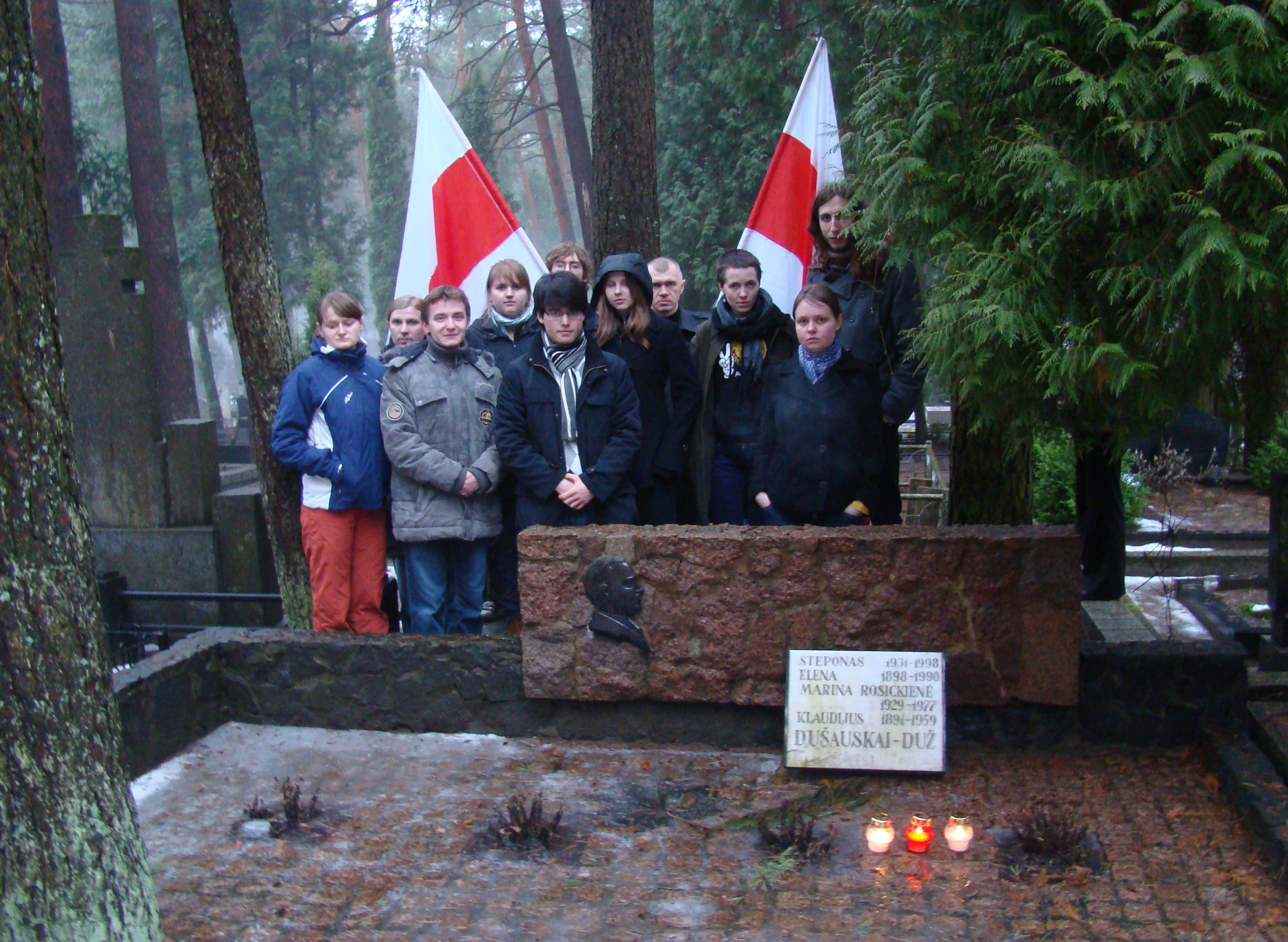 Grupa Białorusinów w biało-czerwono-białymi flagami przy grobie ich autora, Klaudiusza Duż-Duszewskiego. Kowno, 21 marca 2010 r.